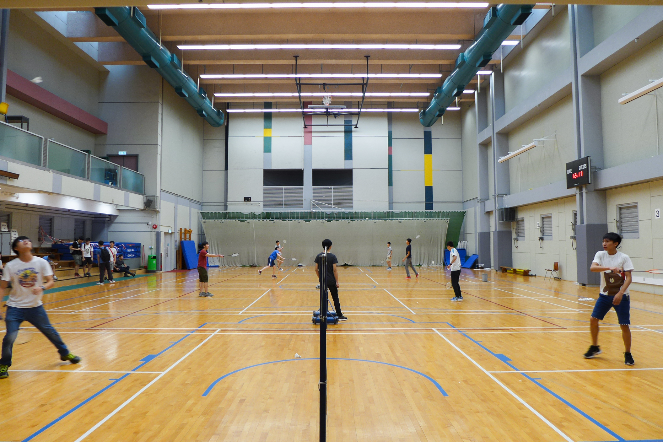 IVE Tsing Yi Campus Multi-purpose Arena